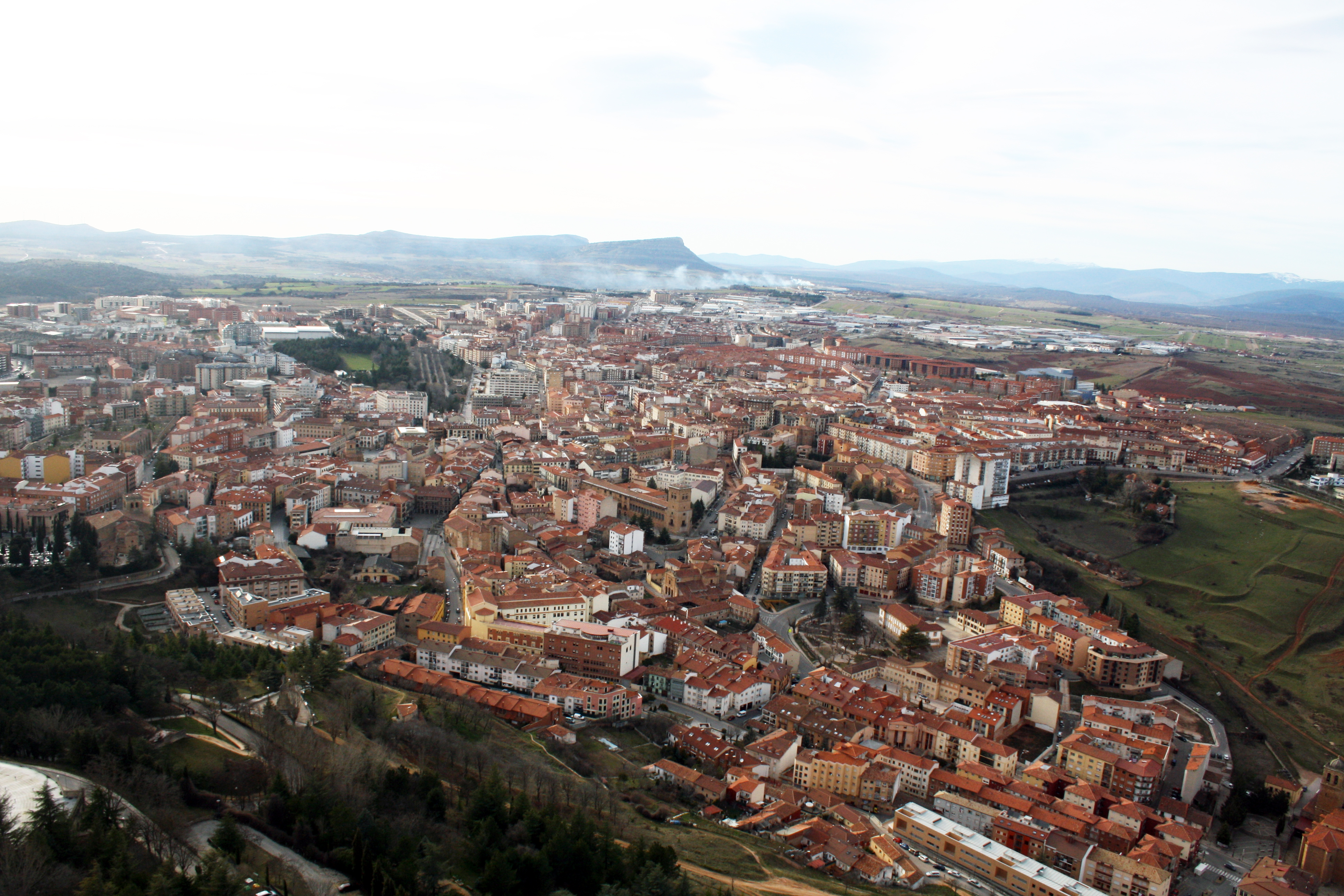 Vista aérea Soria desde el Castillo Foto: JM Oviedo